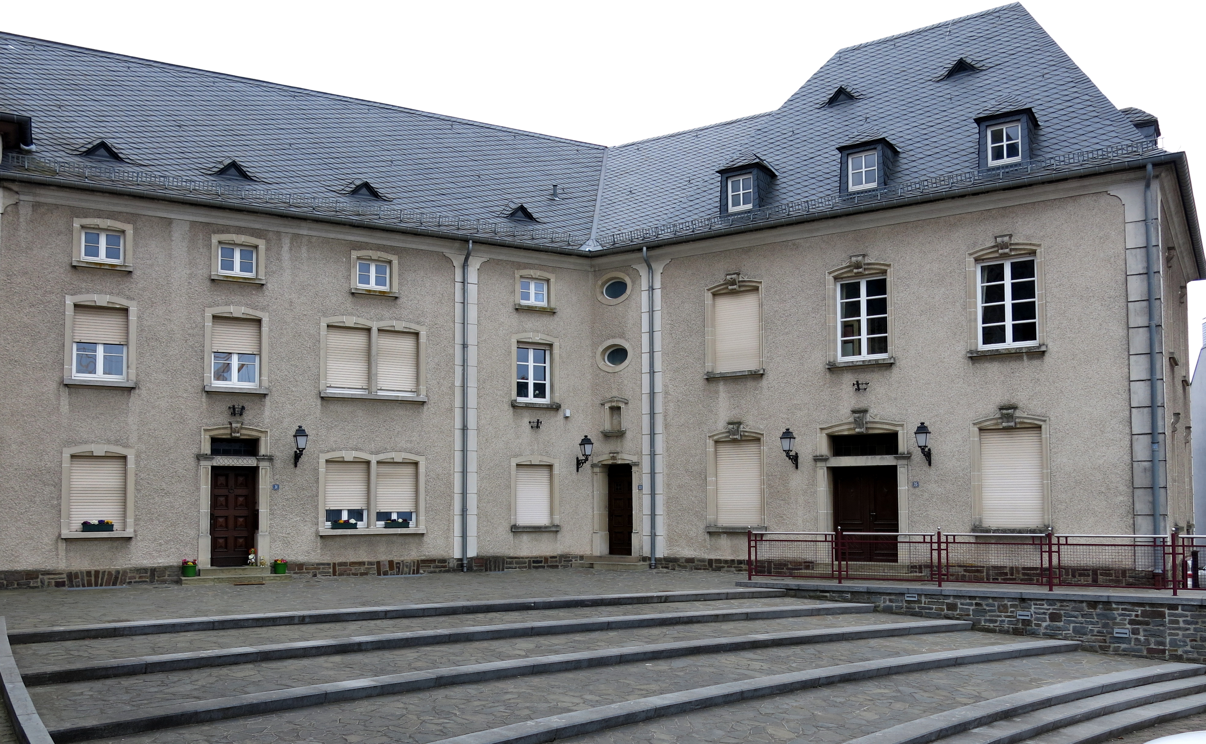 Zu Housen, wou bis vru Kuerzem nach alles seng Uerdnung hat: D'Kierch, d'Märei an d'Primärschoul - alles aus engem Goss.